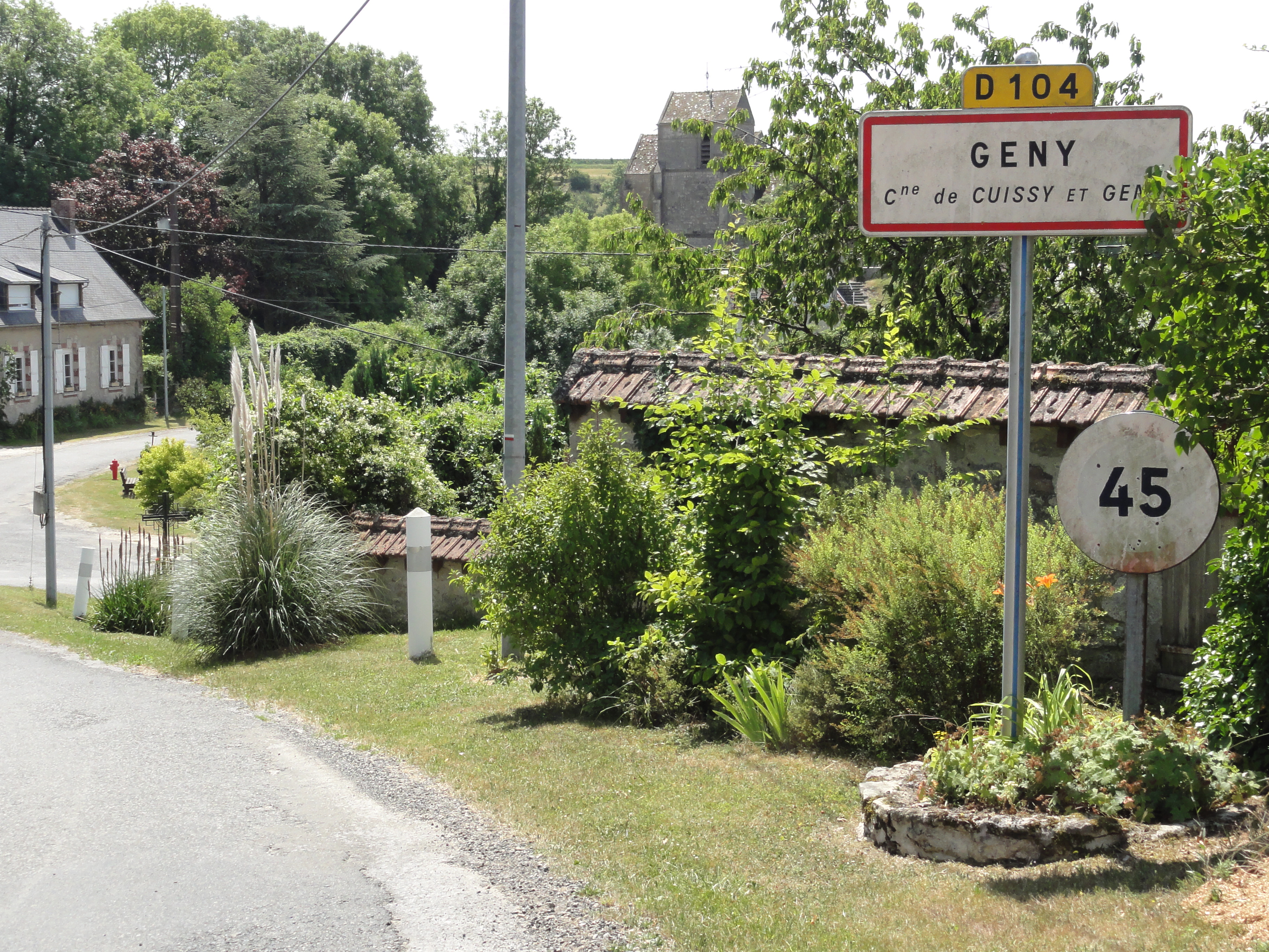 Cuissy-et-Geny (Aisne) city limit sign